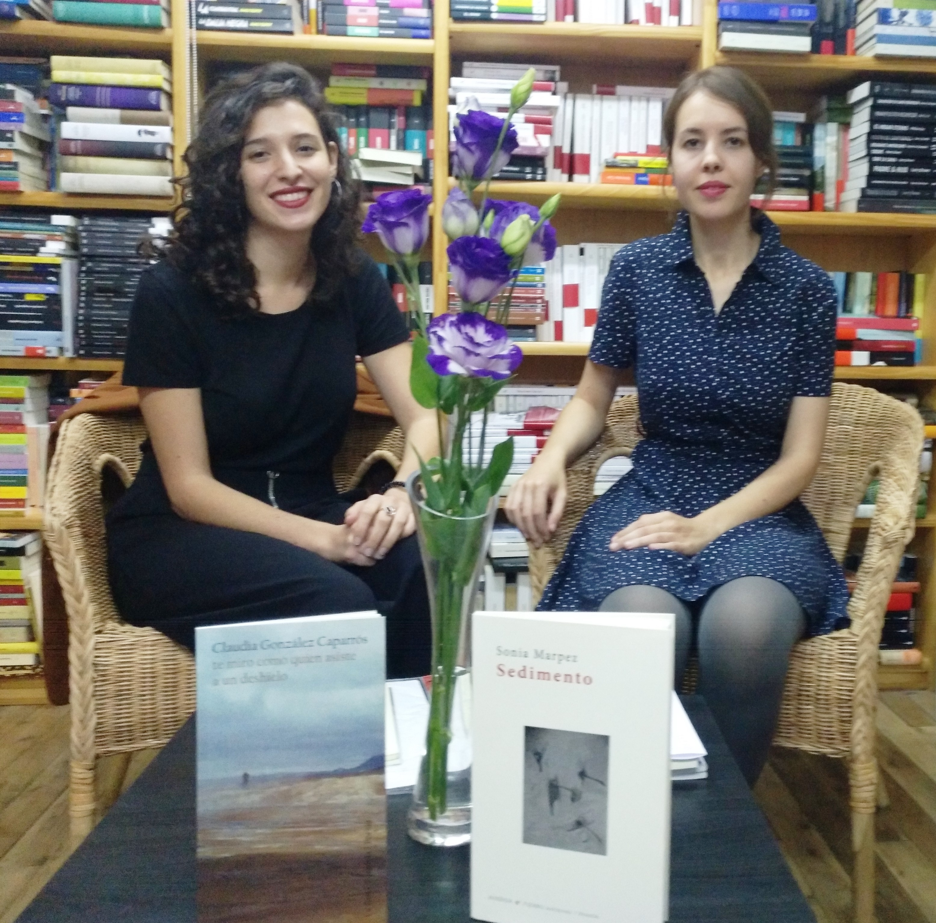 Claudia González Caparrós e Sonia Marpez, presentando a súa poesía na Libraría Paz de Pontevedra